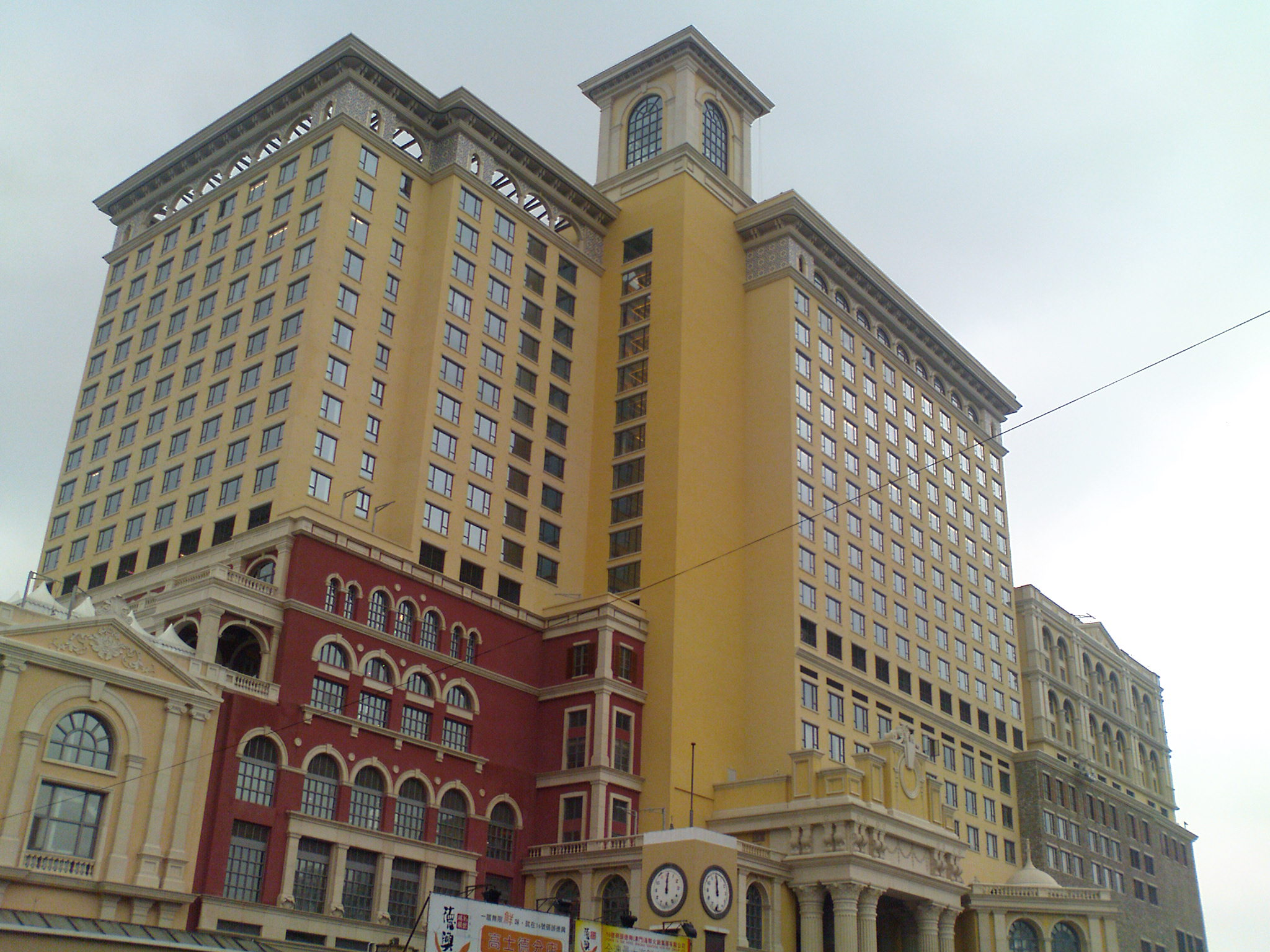 Porte_16_(Macau SAR)